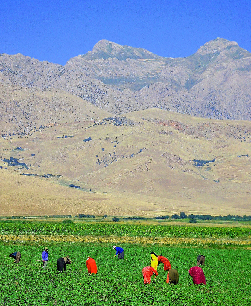 Engliah:Iraqi Kurdish villagers in field near Turkish border Turkish: Türkiye sınırına yakın tarlalarda çalışan Iraklı Kürt köylüler.